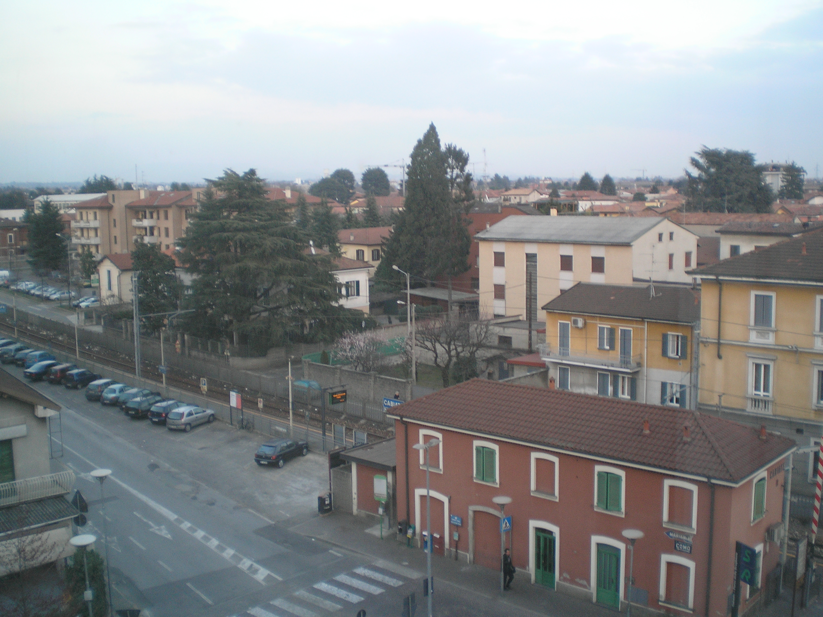 Il panorama del paese di Cabiate.